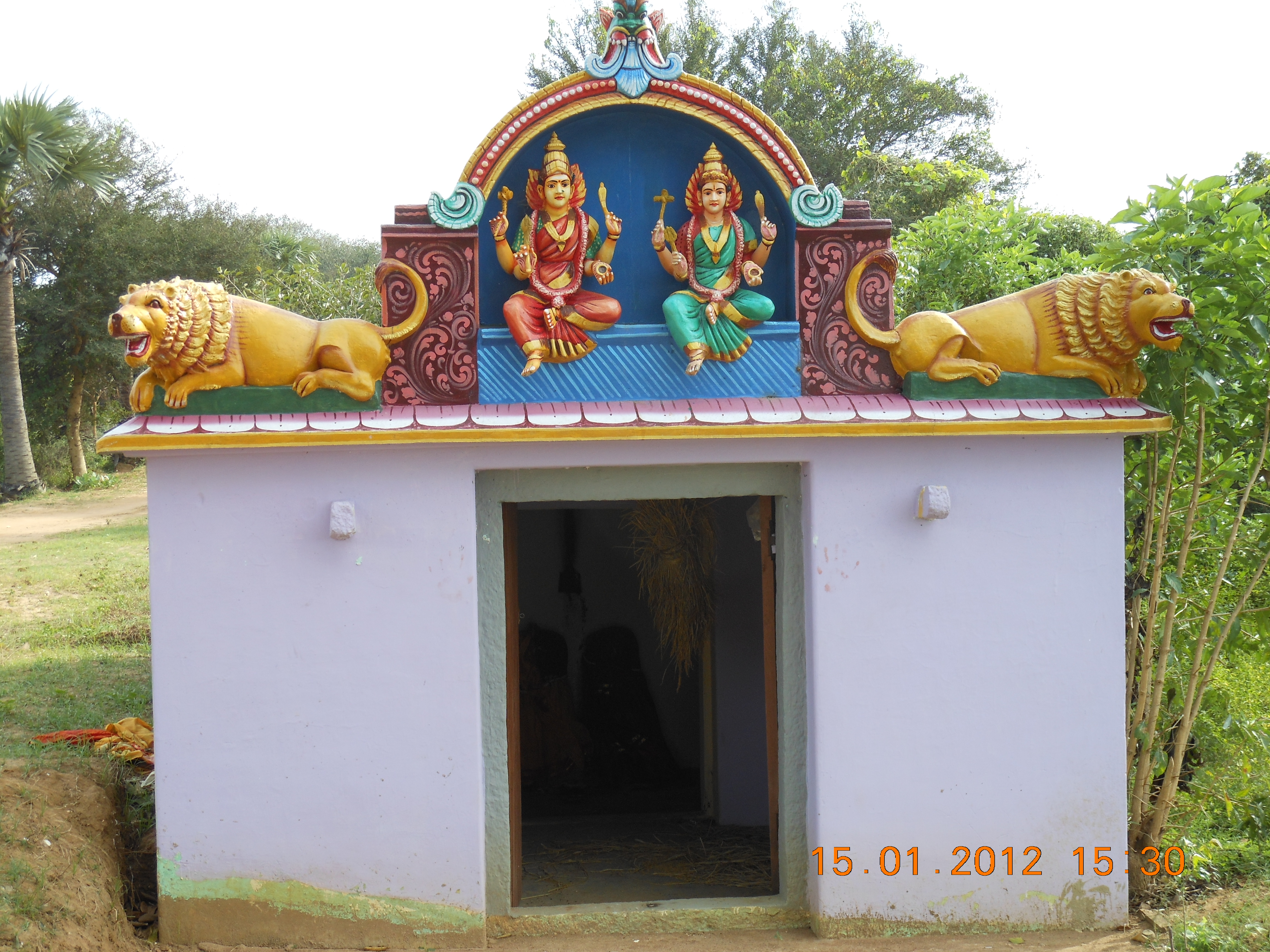 அருள்மிகு பொன்னியம்மன் , செல்லியம்மன் ஆலயம்